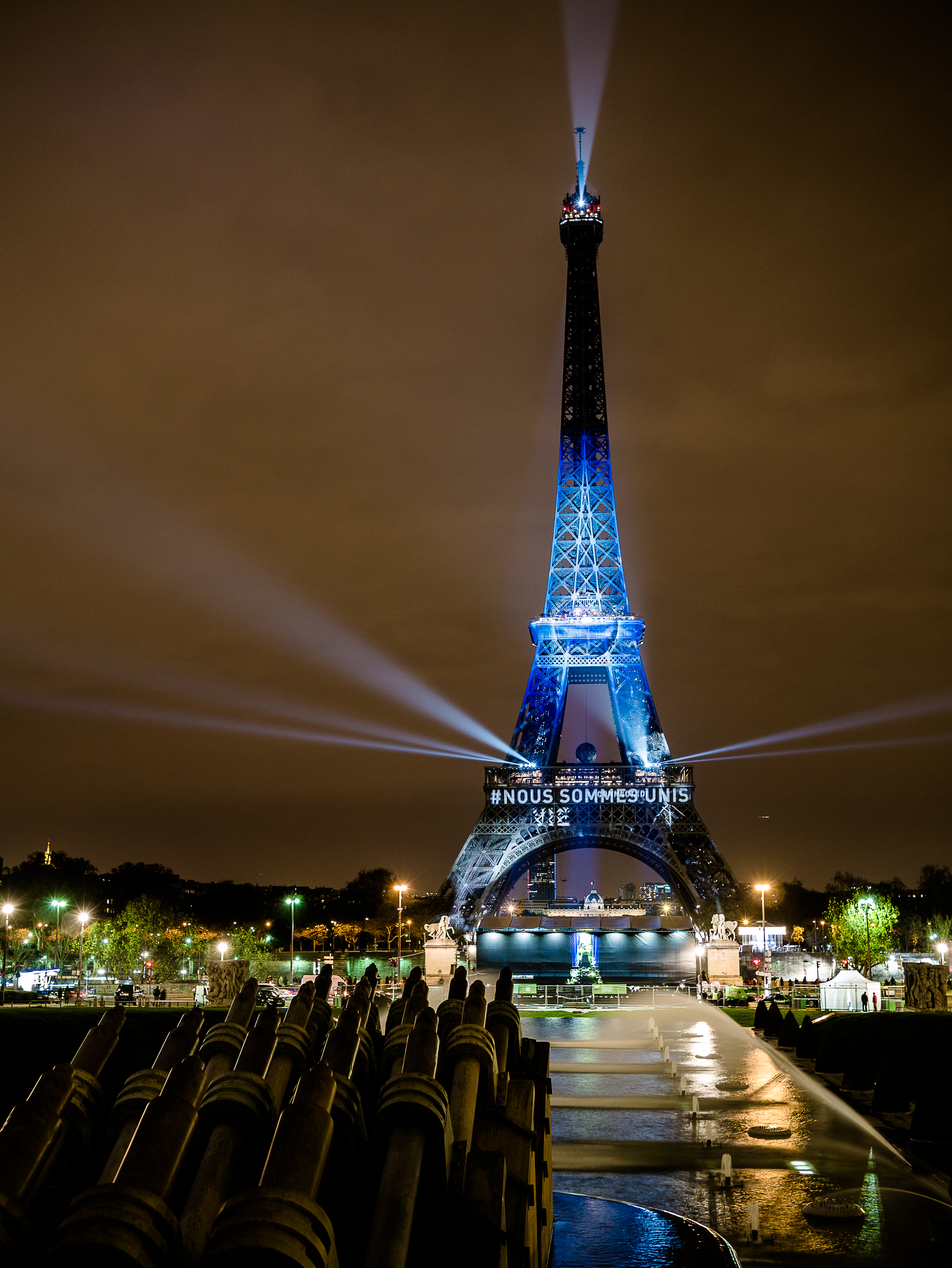 Oeuvre de Naziha Mestaoui